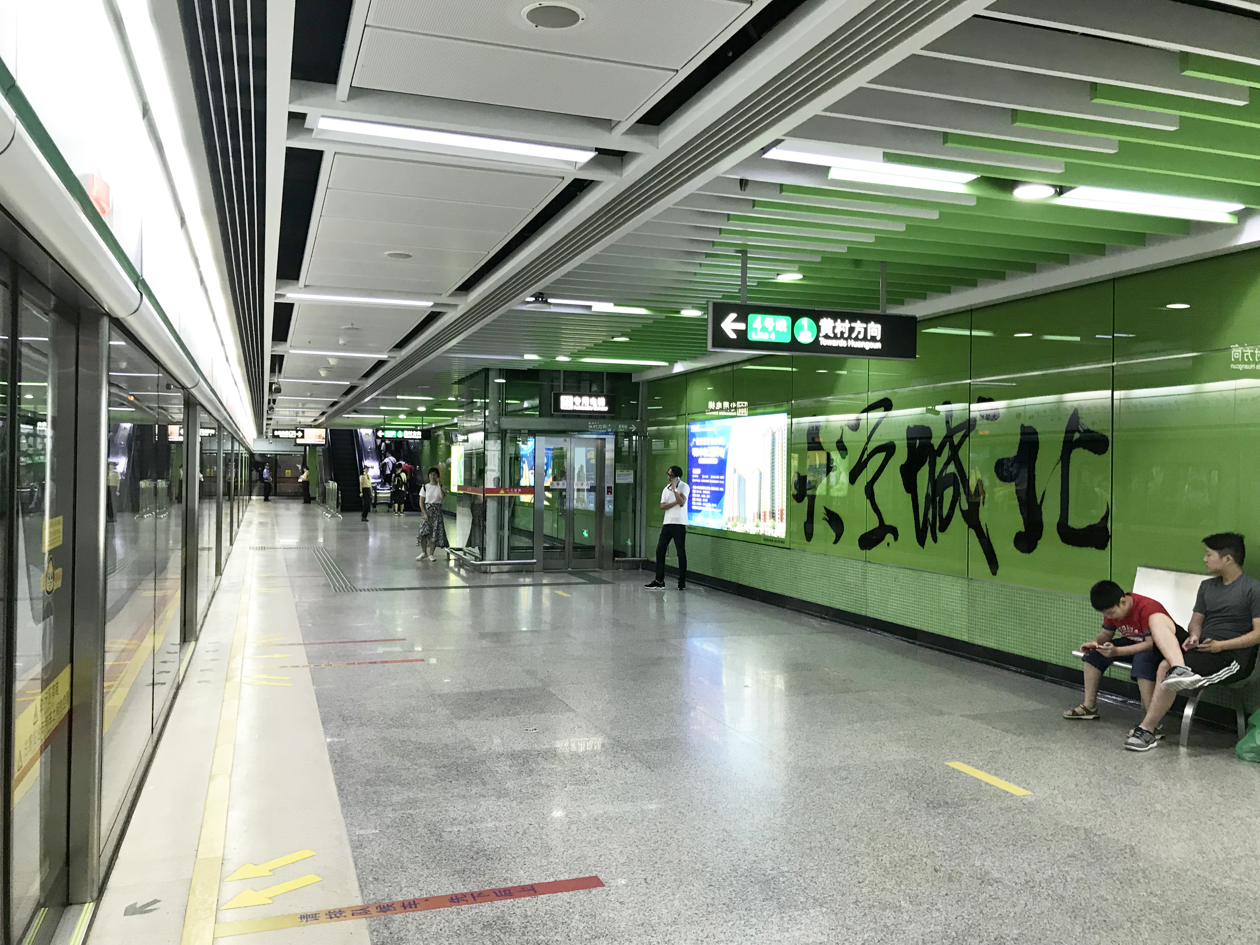 广州地铁大学城北站